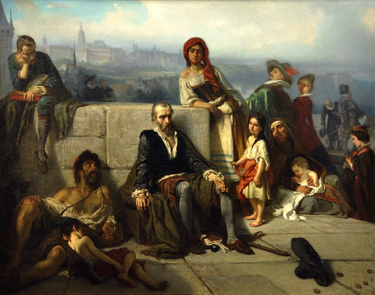 Slavný obraz spisovatele, první český obraz vystavený na Salonu pařížské Akademie umění, kterým se mladý Čermák ve Francii prosadil.